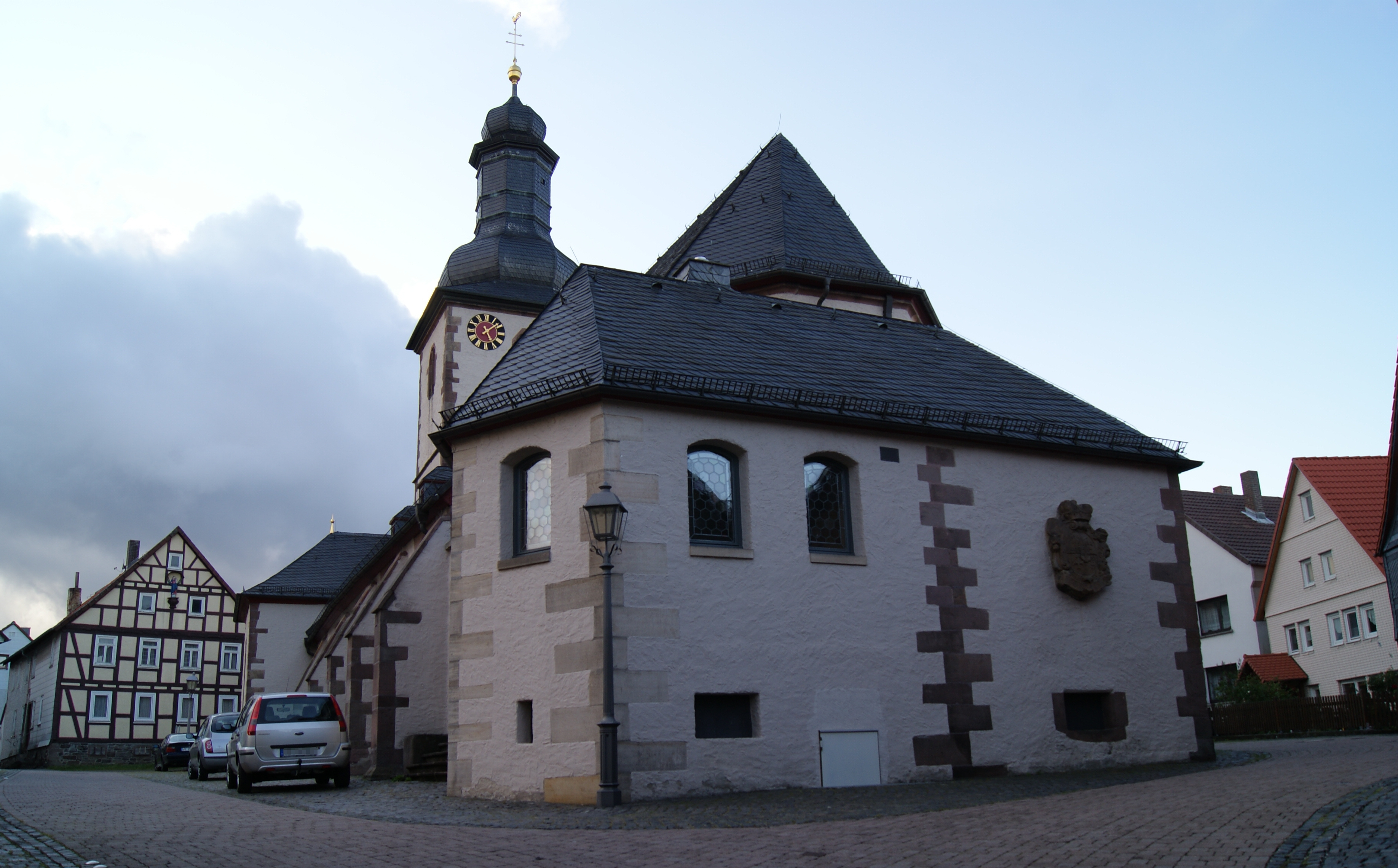 Außenansicht der Katholische Kirche St. Jakobus in Herbstein.